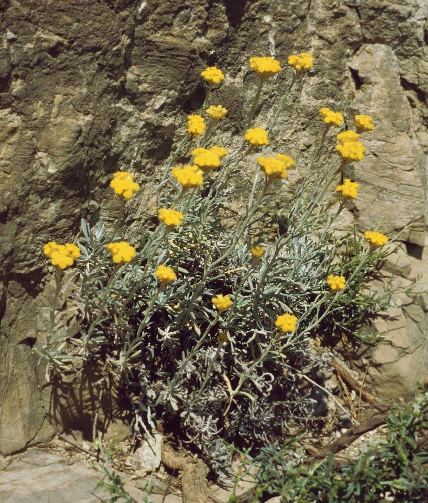 Helichrysum stoechas subsp. barrelieri, Korbblütler (Asteraceae) – Griechenland/Ελλάδα/Greece: Erisos/Έρισος, Assos/Άσσος, Südhang des Festungsbergs (Kefallinia/Κεφαλληνία)